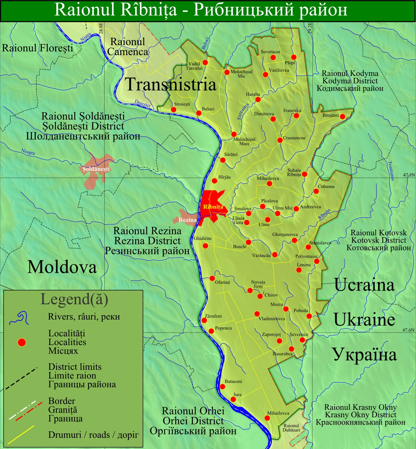 Raionul Rîbniţa din Transnistria, Republica Moldova.